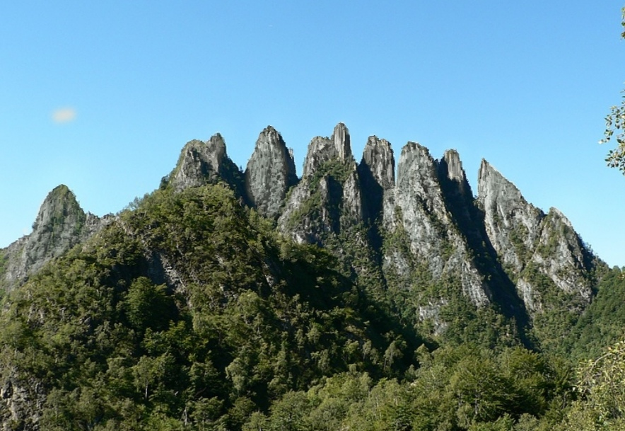 Denti di Gavala nel comune di scopa, guglie di roccia